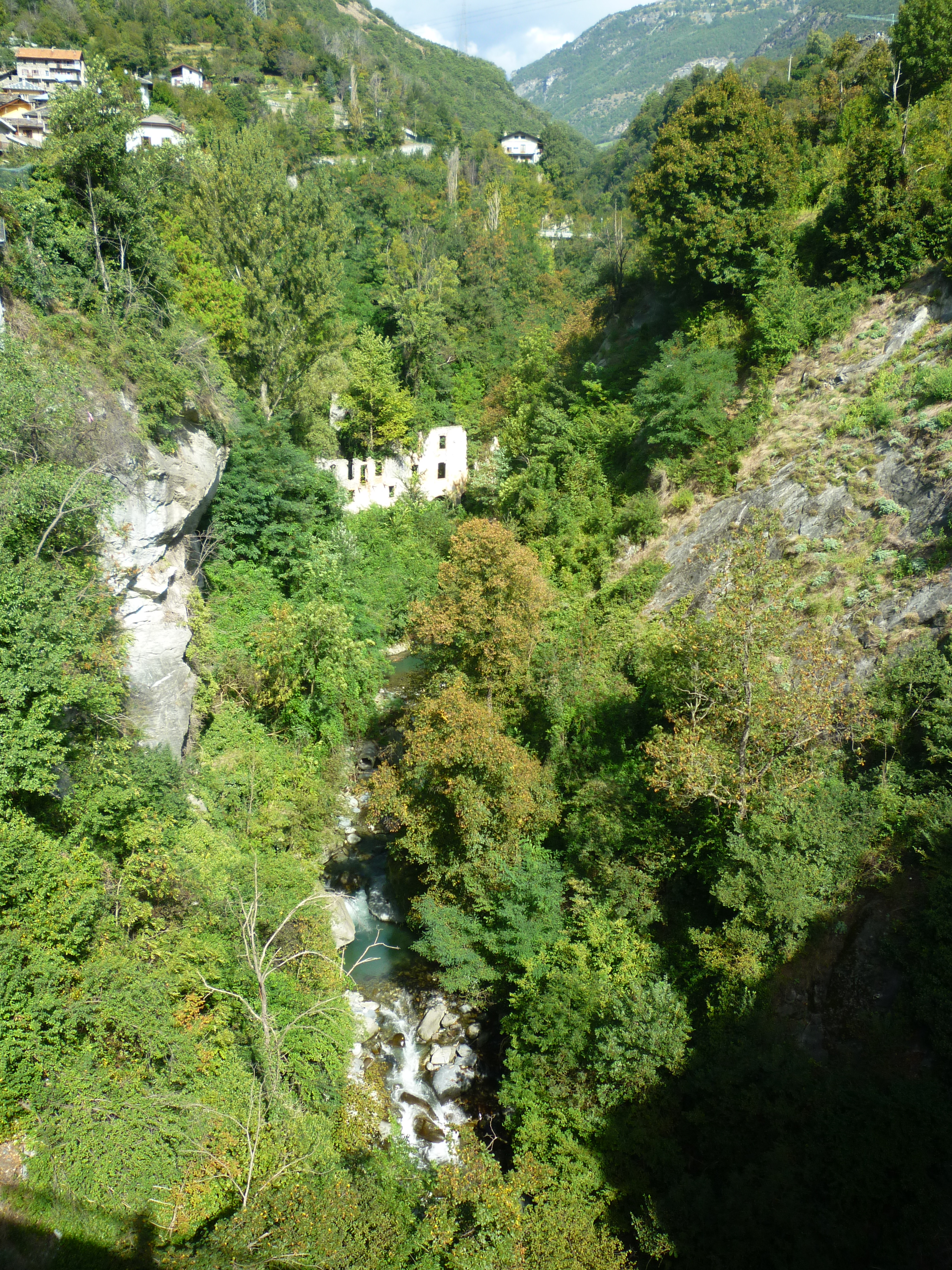 Fonderie Gervasone à (Châtillon, Vallée d'Aoste)